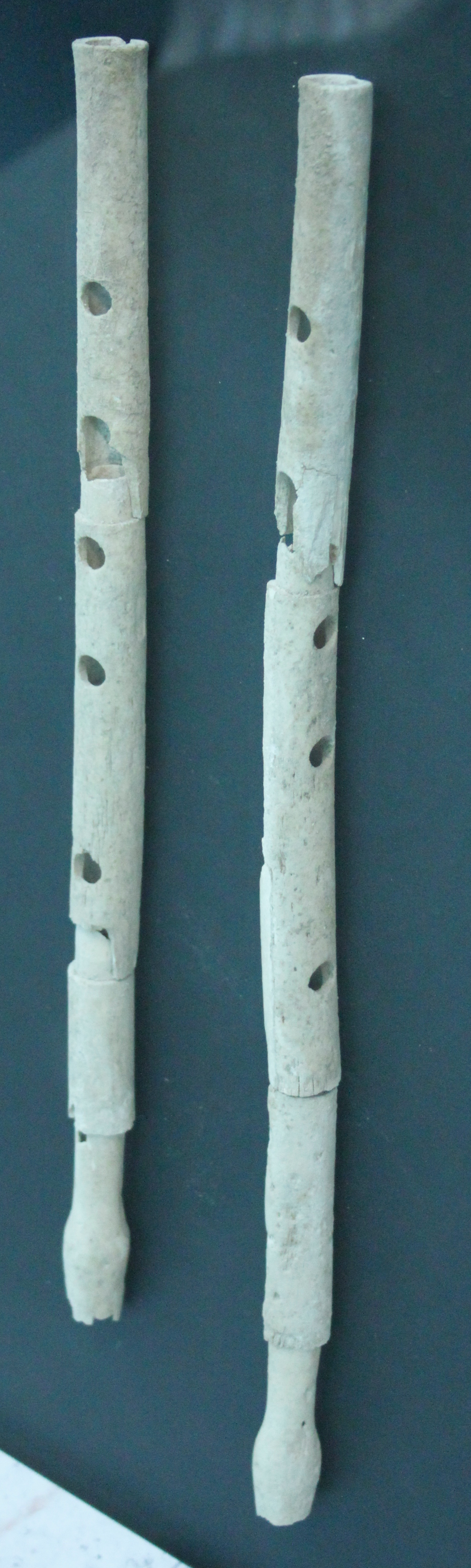 Aulos (flauto greco antico) in osso di cervo, risalente agli inizi del V secolo a.C. rinvenuto a Paestum, nella Tomba 21, in località Tempa del Prete e conservato al Museo archeologico nazionale di Paestum.